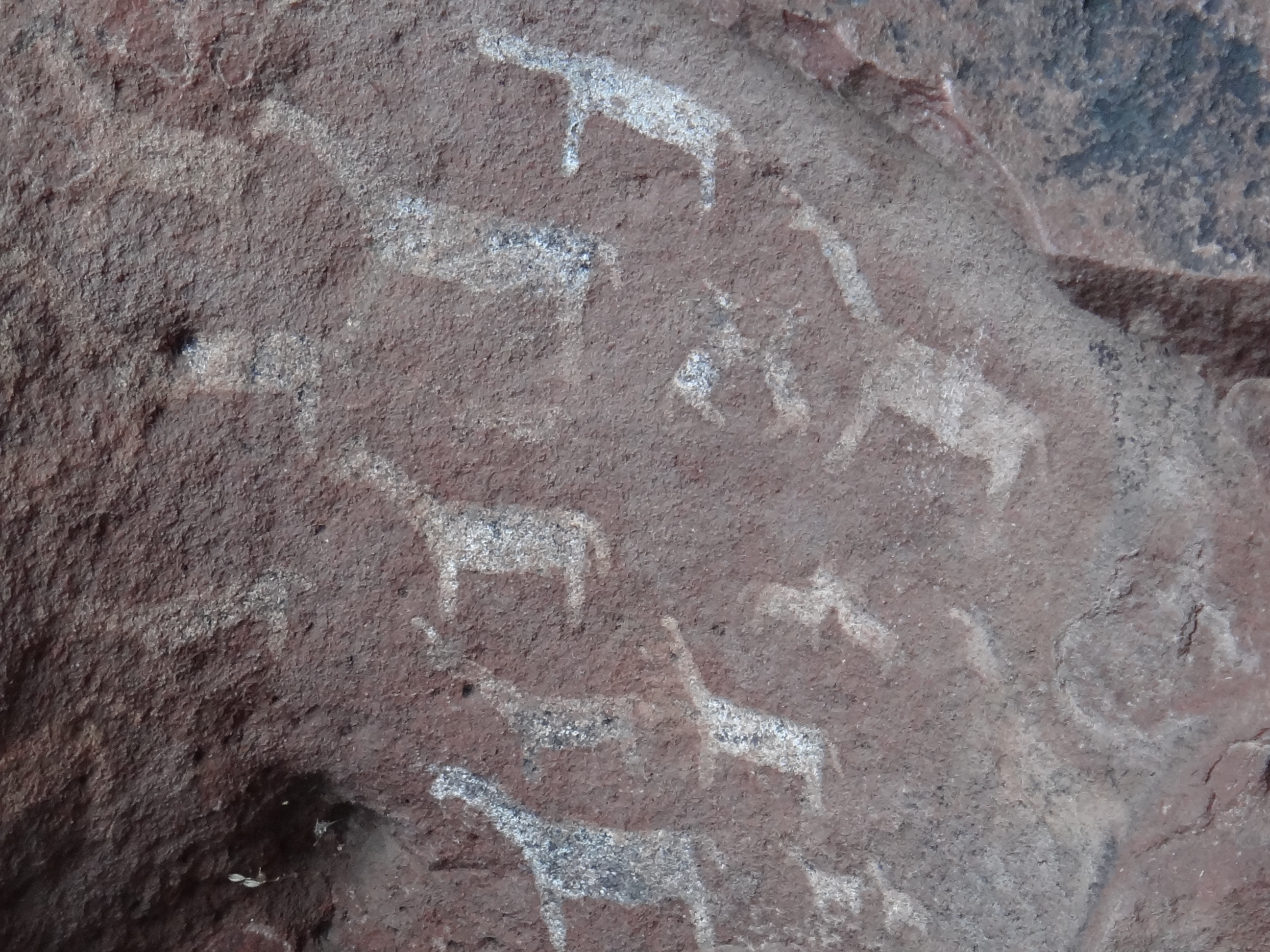 Yacimiento de arte rupestre en las Cuevas Pintadas